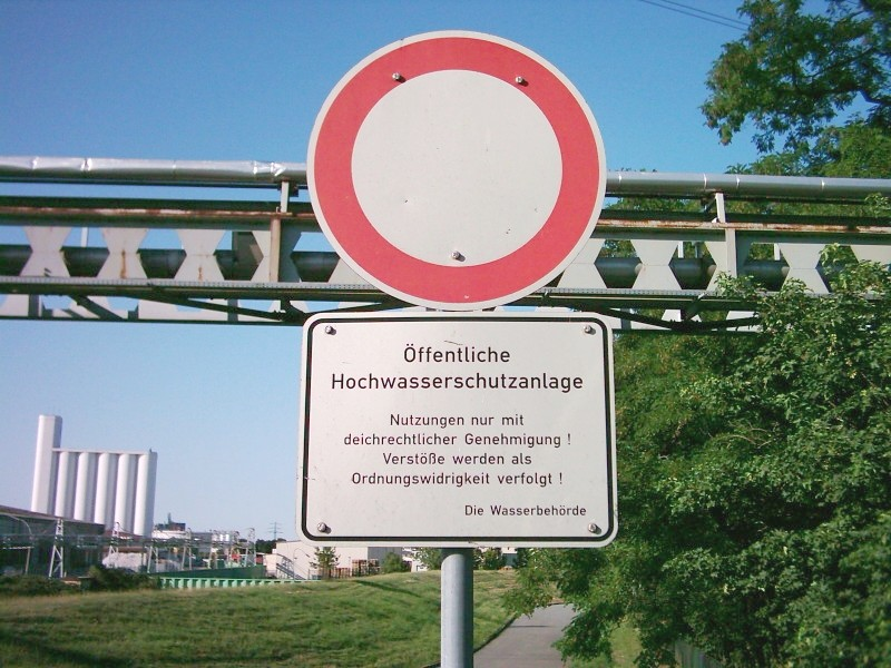 Hinweis- und Verbotsschild für eine Hochwasserschutzanlage in Hamburg-Harburg.